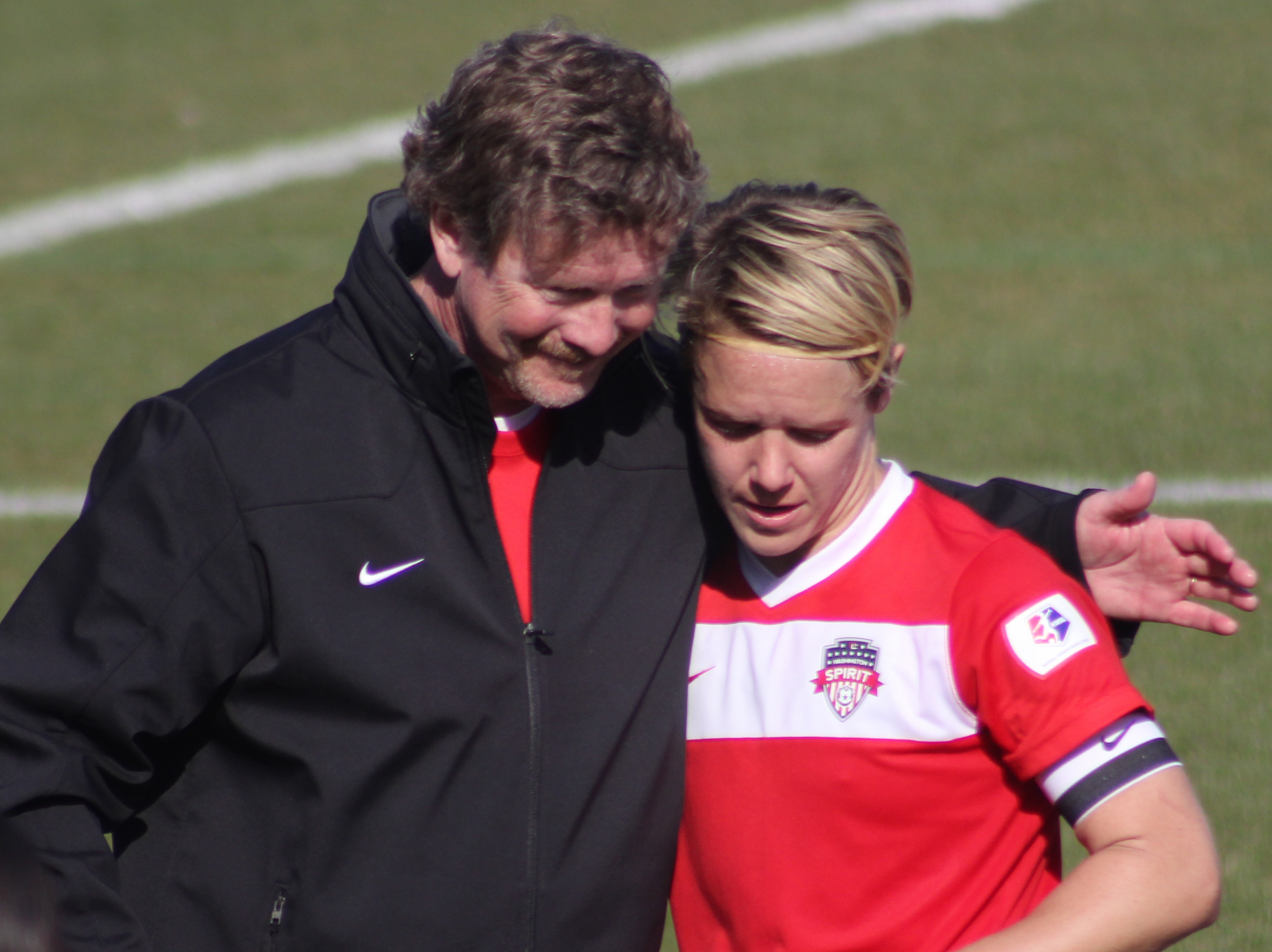 Mike Jorden and Lori Lindsey (2013)